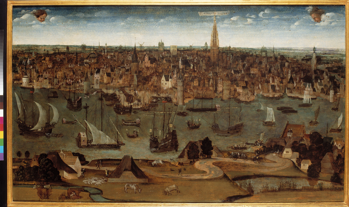 Antwerpia in Brabancia, anoniem, ca 1540, MAS